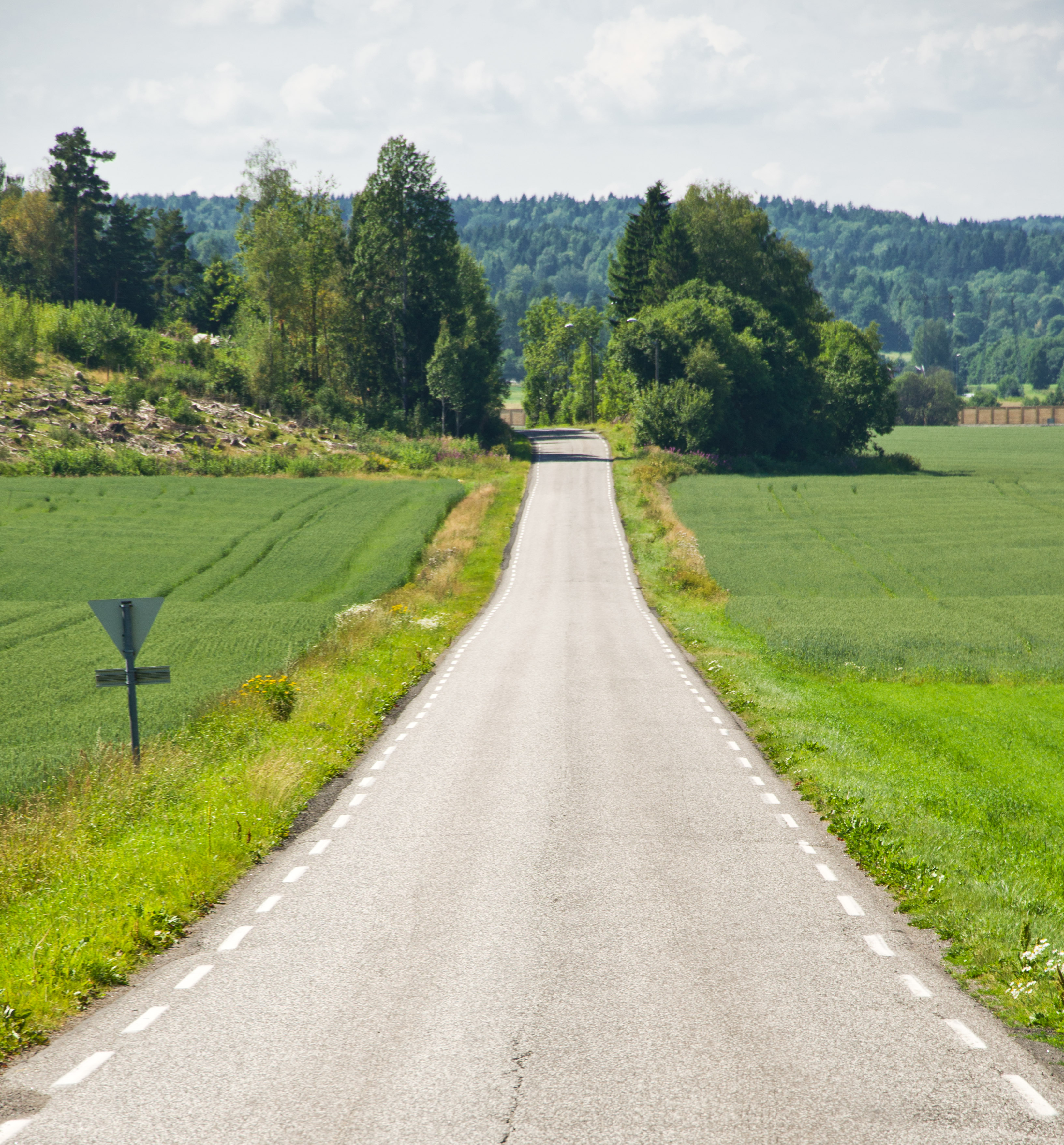 Fylkesvei 520 Askehaugveien i Tønsberg, Vestfold, Norge